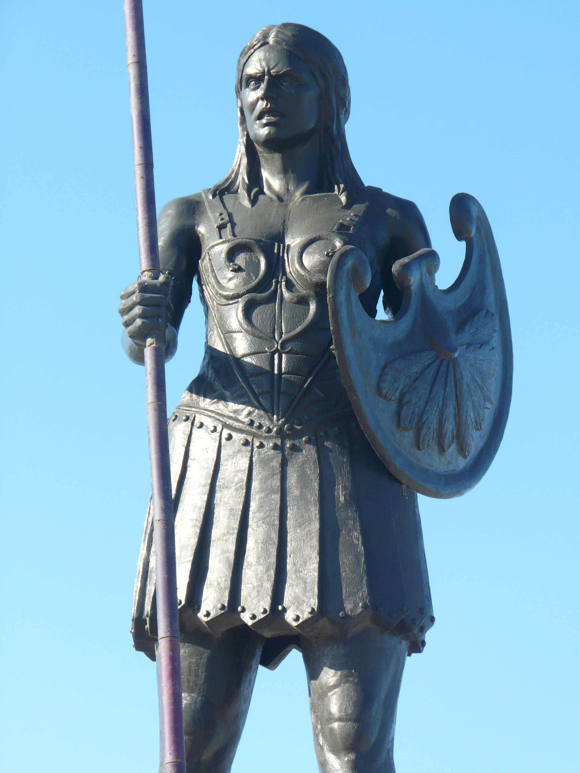 Samsun'dan çeşitli görüntüler